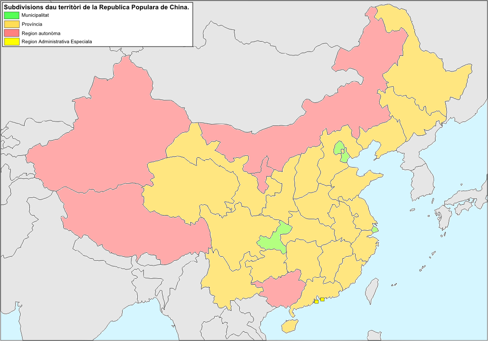 Subdivisions territòrialas de la Republica Populara de China.